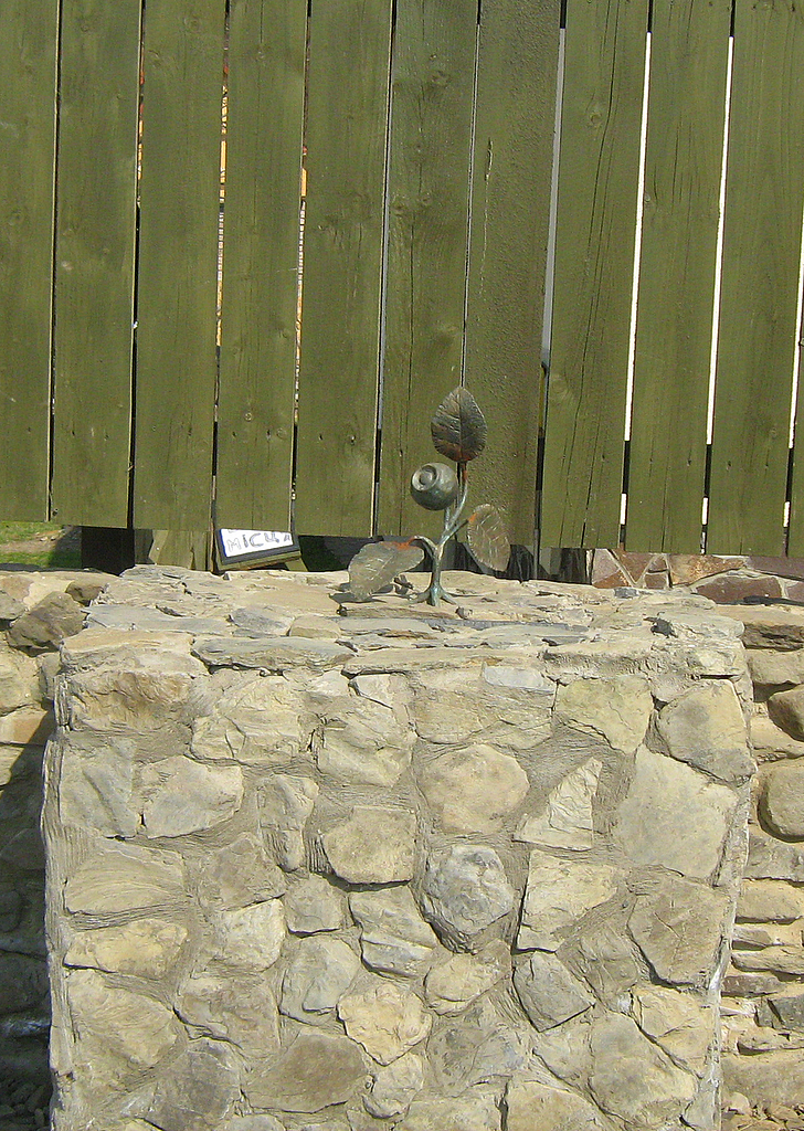 Памятник чернике в с.Гукливый Воловецкого района Закарпатской области (Украина).